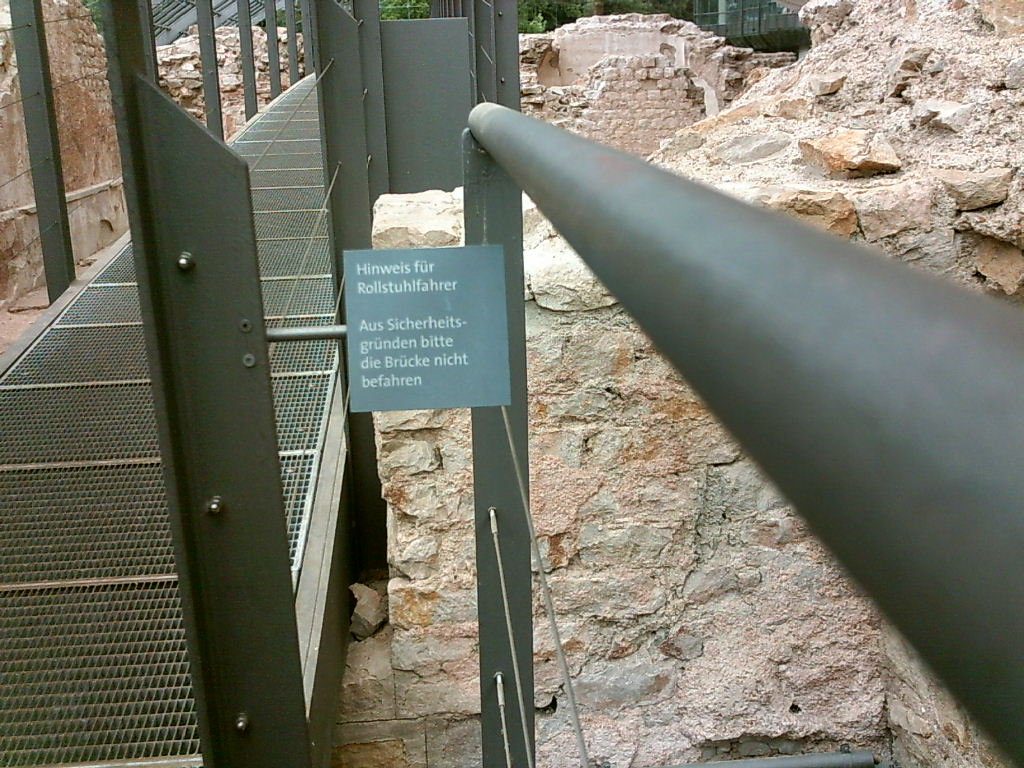 Römische Badruine in Badenweiler - keine Barrierefreiheit